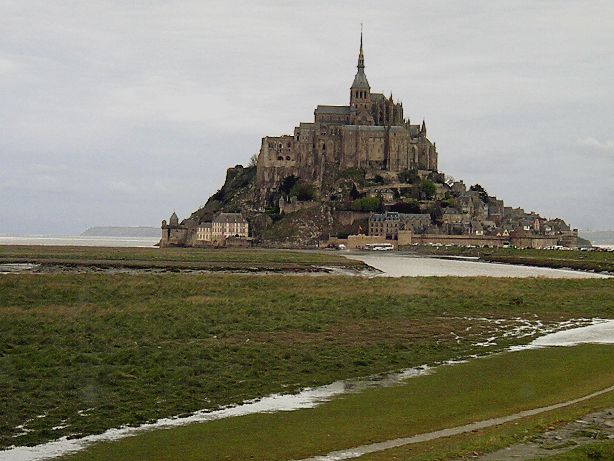 Гора Мон-Сен-Мишель.Общий вид.